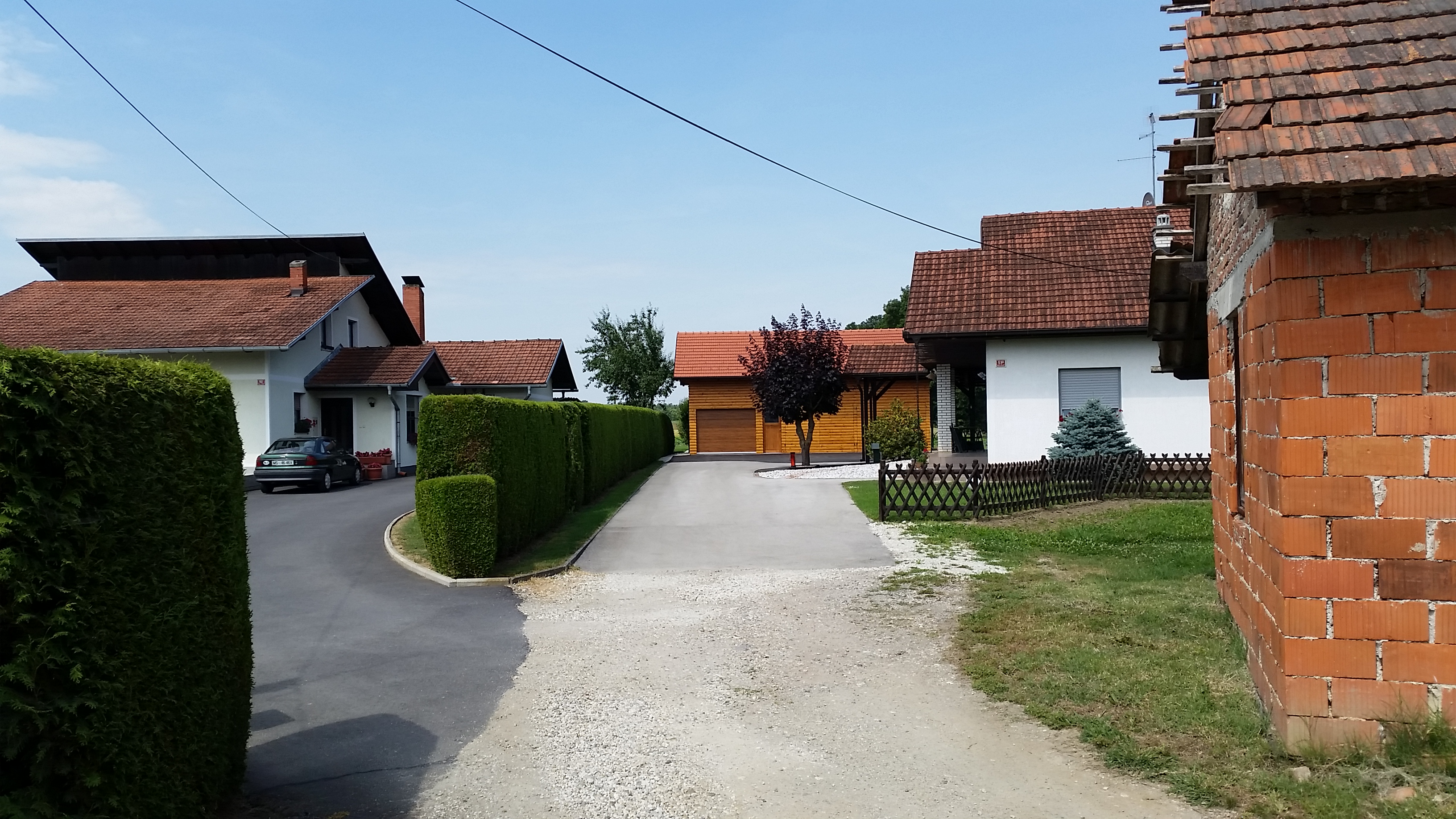 9225 Mala Polana, Slovenia